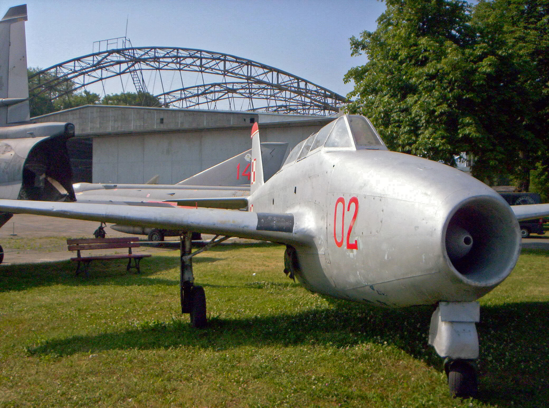 Jak-17 UTI